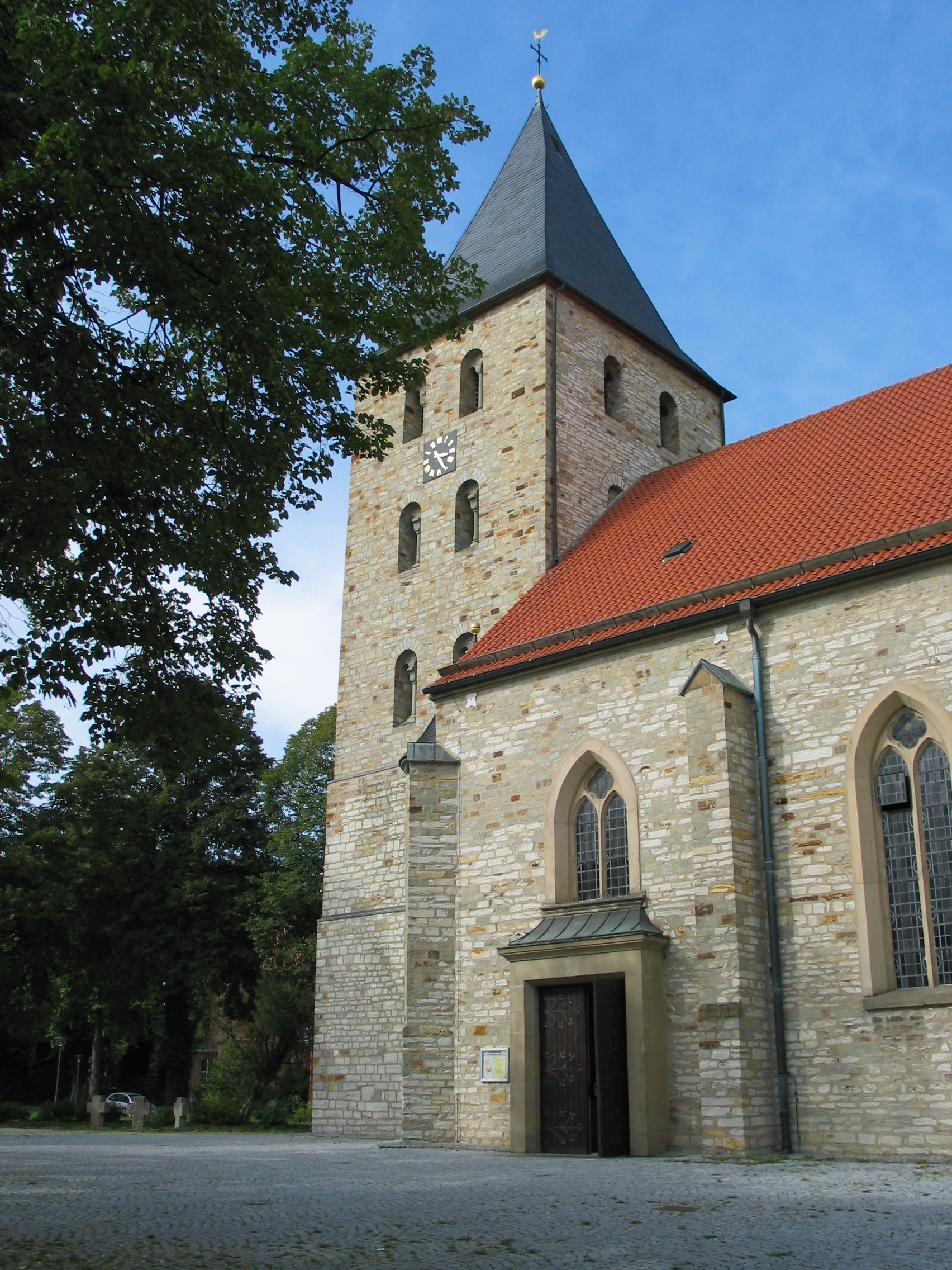 Turm der Kirche St. Dionysius und Urban (Elsen) Sicht von der Von-Ketteler-Straße in Richtung Pfarrhaus